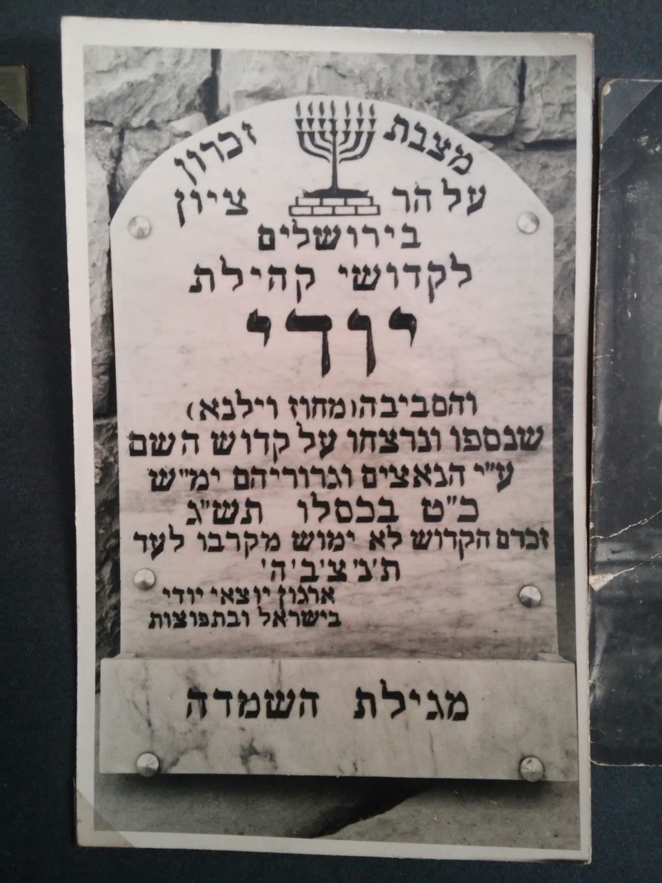 תמונה של המצבה לזכר נספי העיירה יוד בשואה, שנמצאת בהר ציוןבירושלים